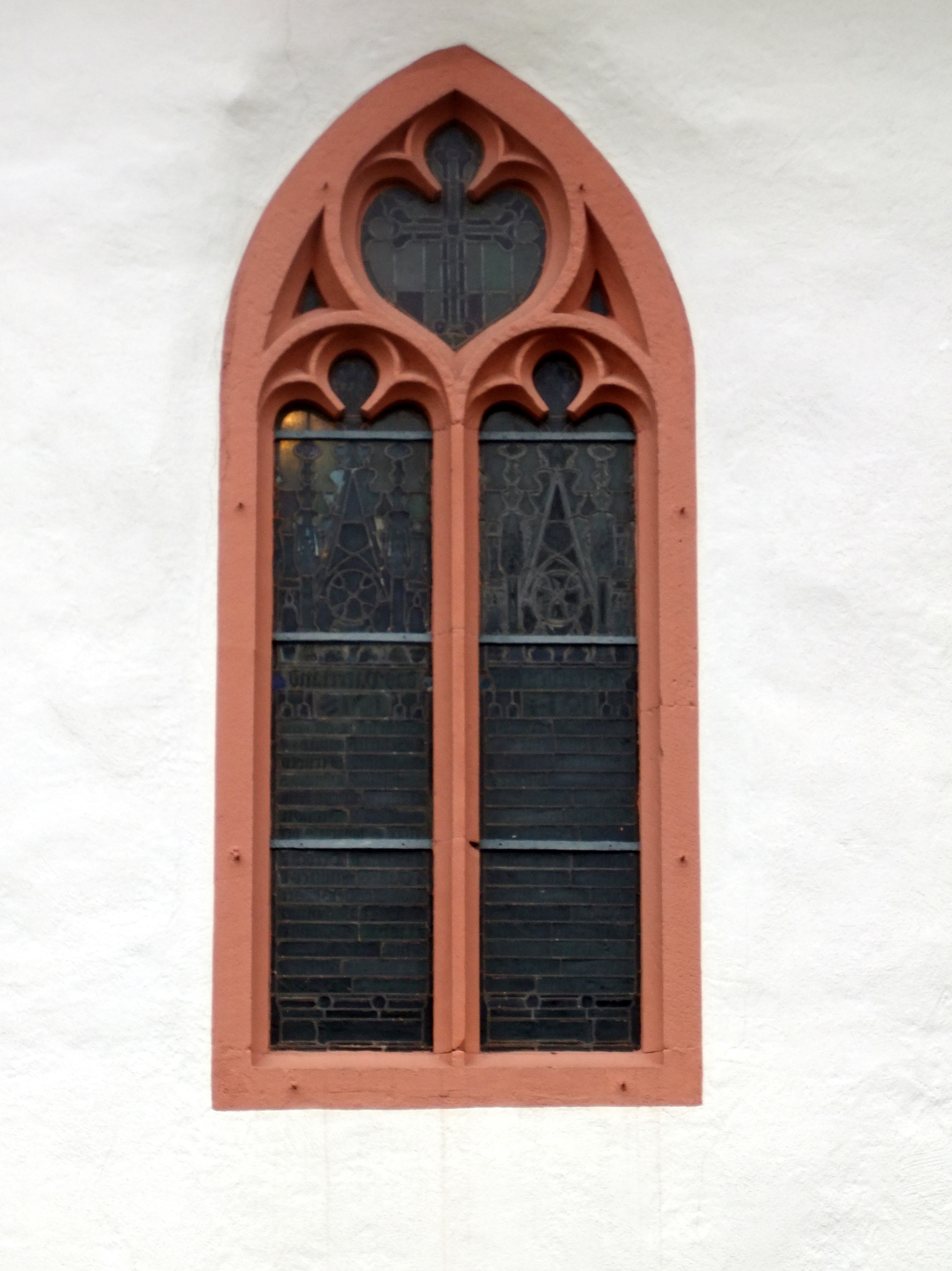 Evangelische Kirche Buchenau in Dautphetal-Buchenau, Maßwerkfenster im Kirchenschiff